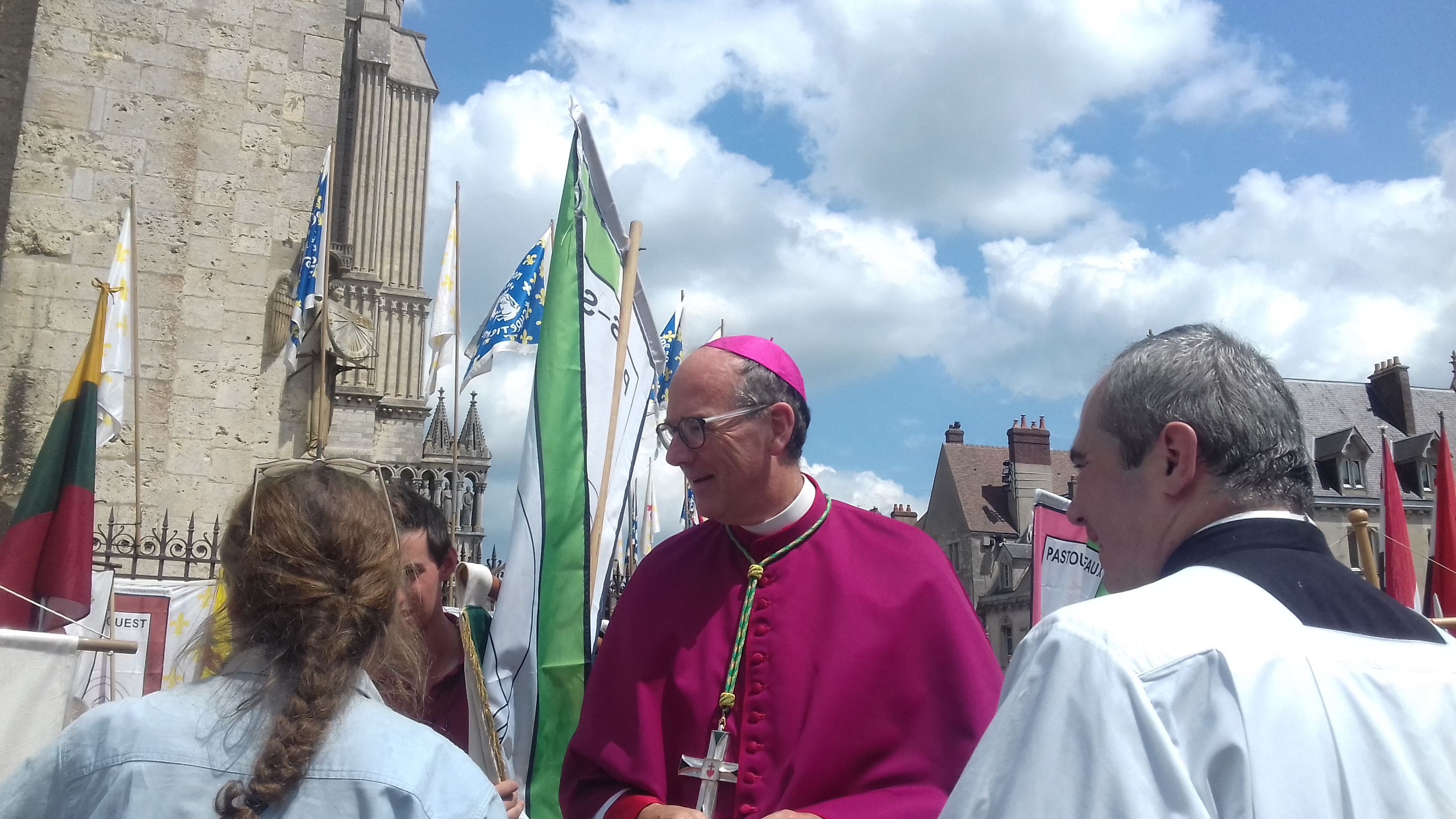 Mgr Philippe Christory avant la messe finale du Pèlerinage de Chrétienté à Chartes de 2018.